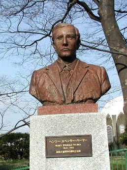 Henry Spencer Palmer, bust at Yokohama Nogiyama Park, Japan